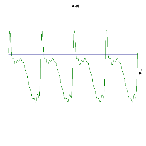 Ejemplo de Onda Periodica